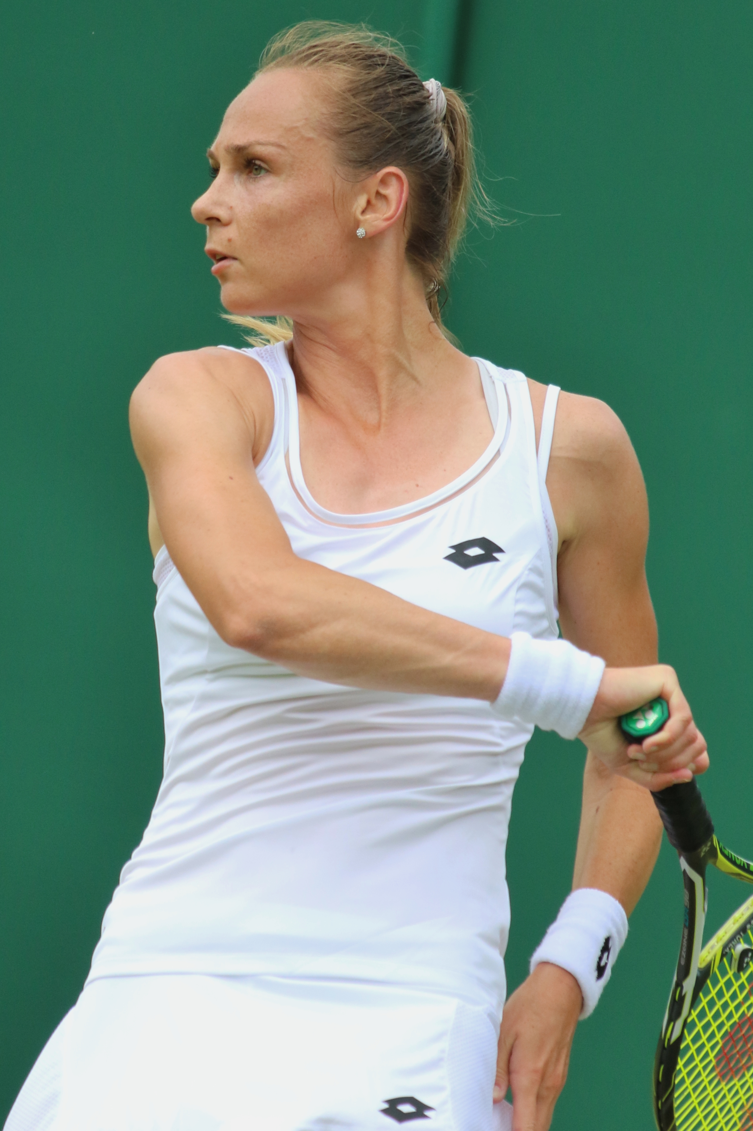 Rybarikova WM17 (6)